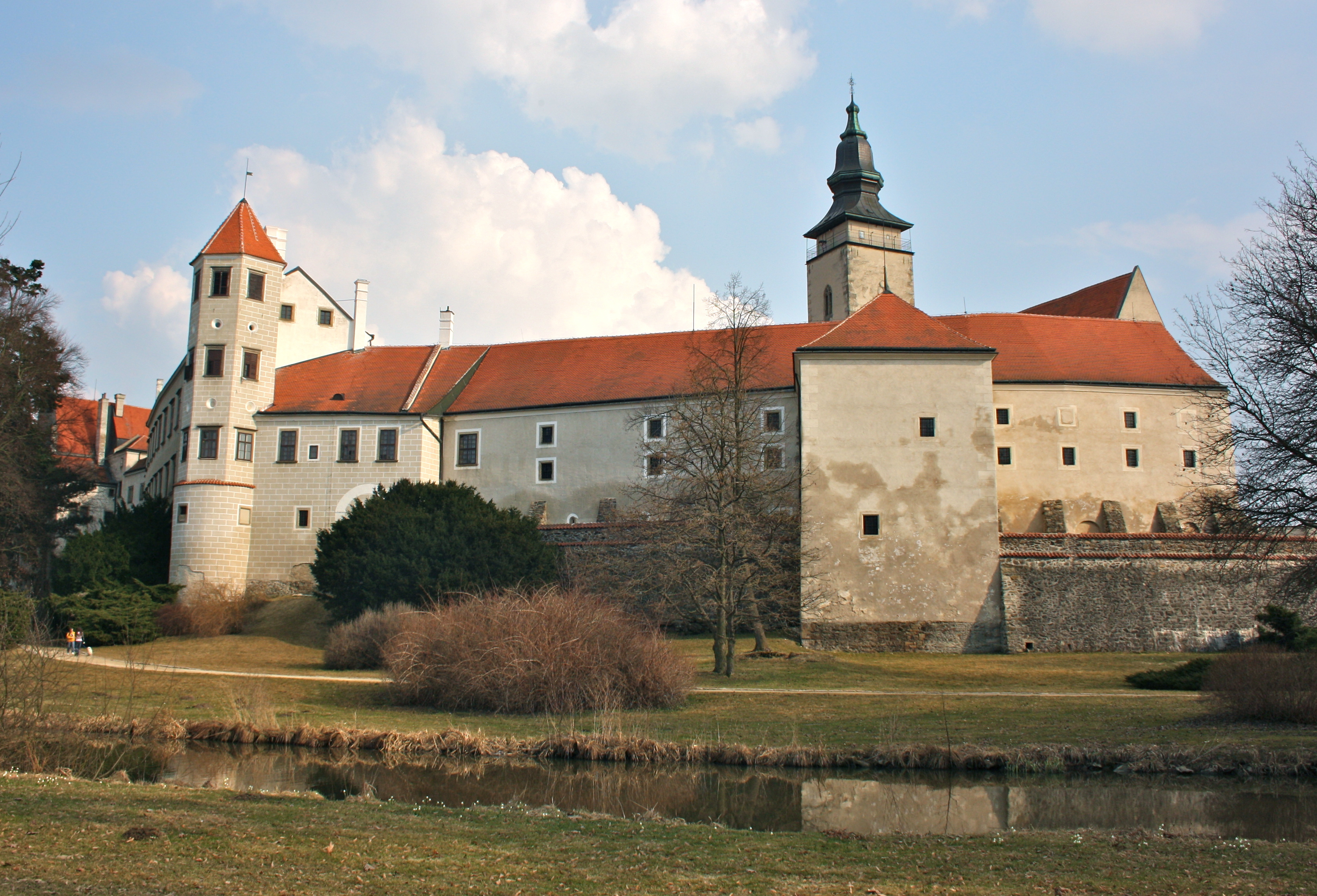 Zámek Telč, nám. Zachariáše z Hradce 1, Telč